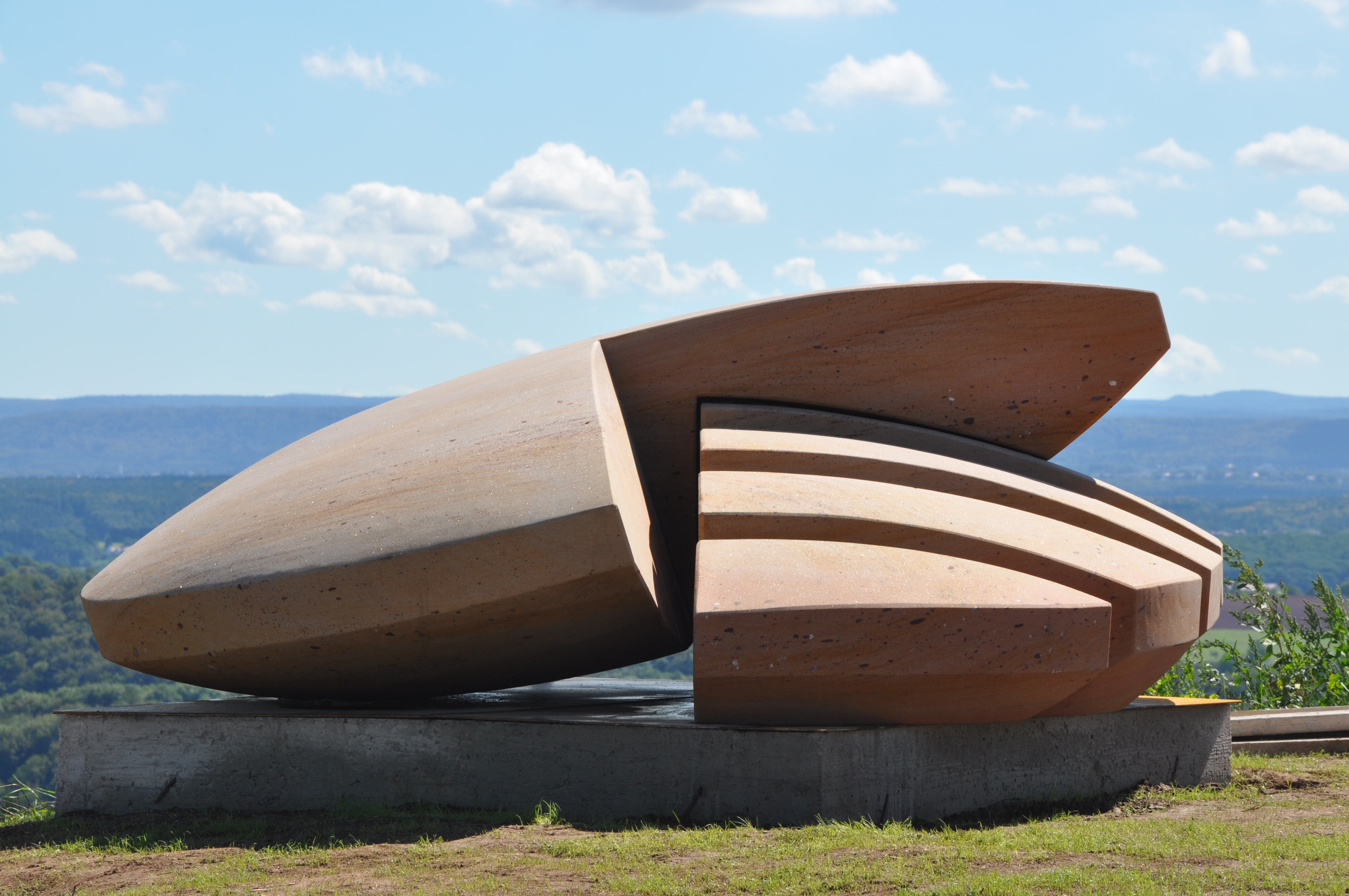 Standort: Eulenbis